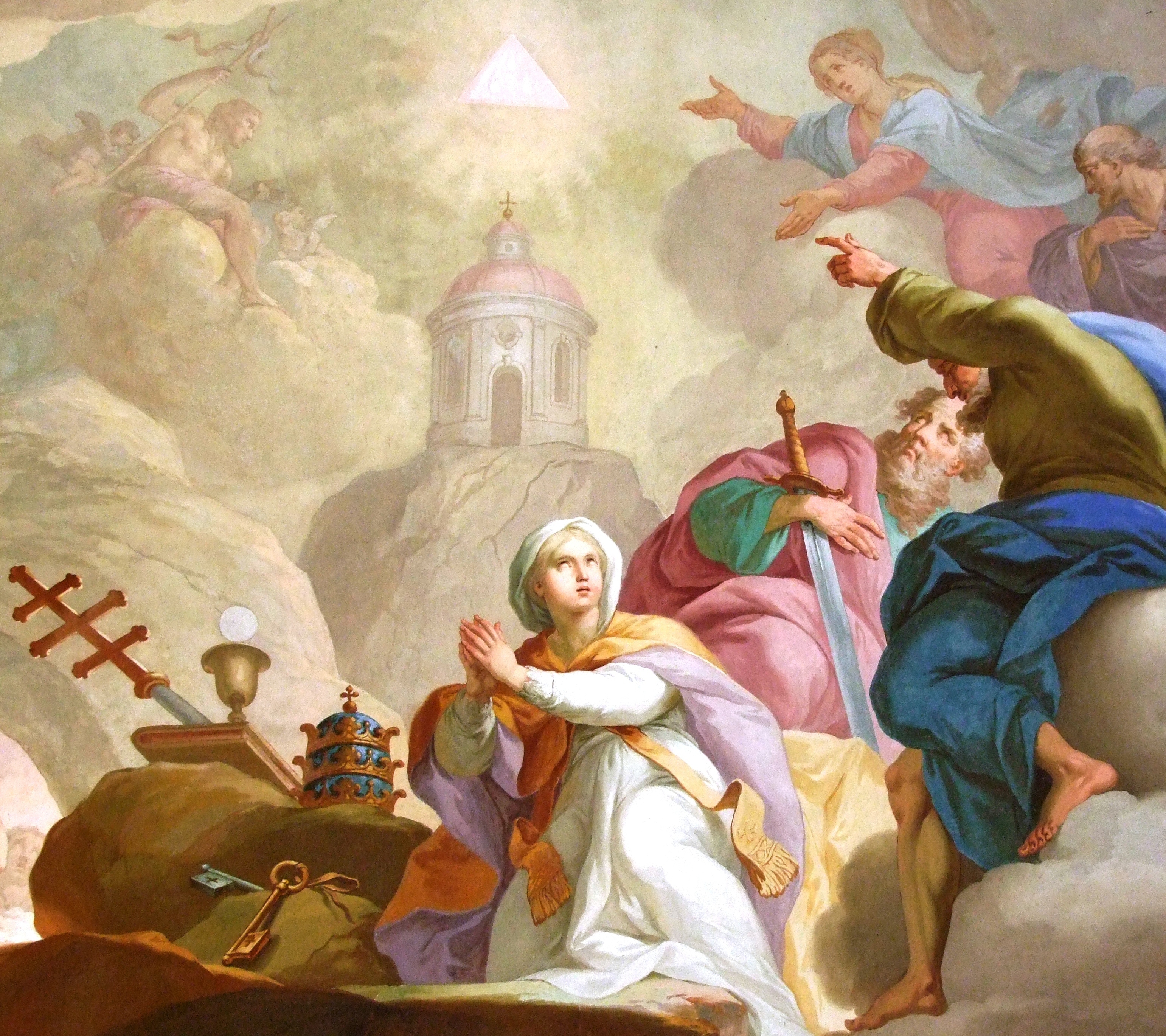 St. Georg, ehemalige Klosterkirche des oberschwäbischen Klosters Ochsenhausen, Ausschnitt des Bildes St. Georg Ochsenhausen - Credo Zyklus 10-3.JPG